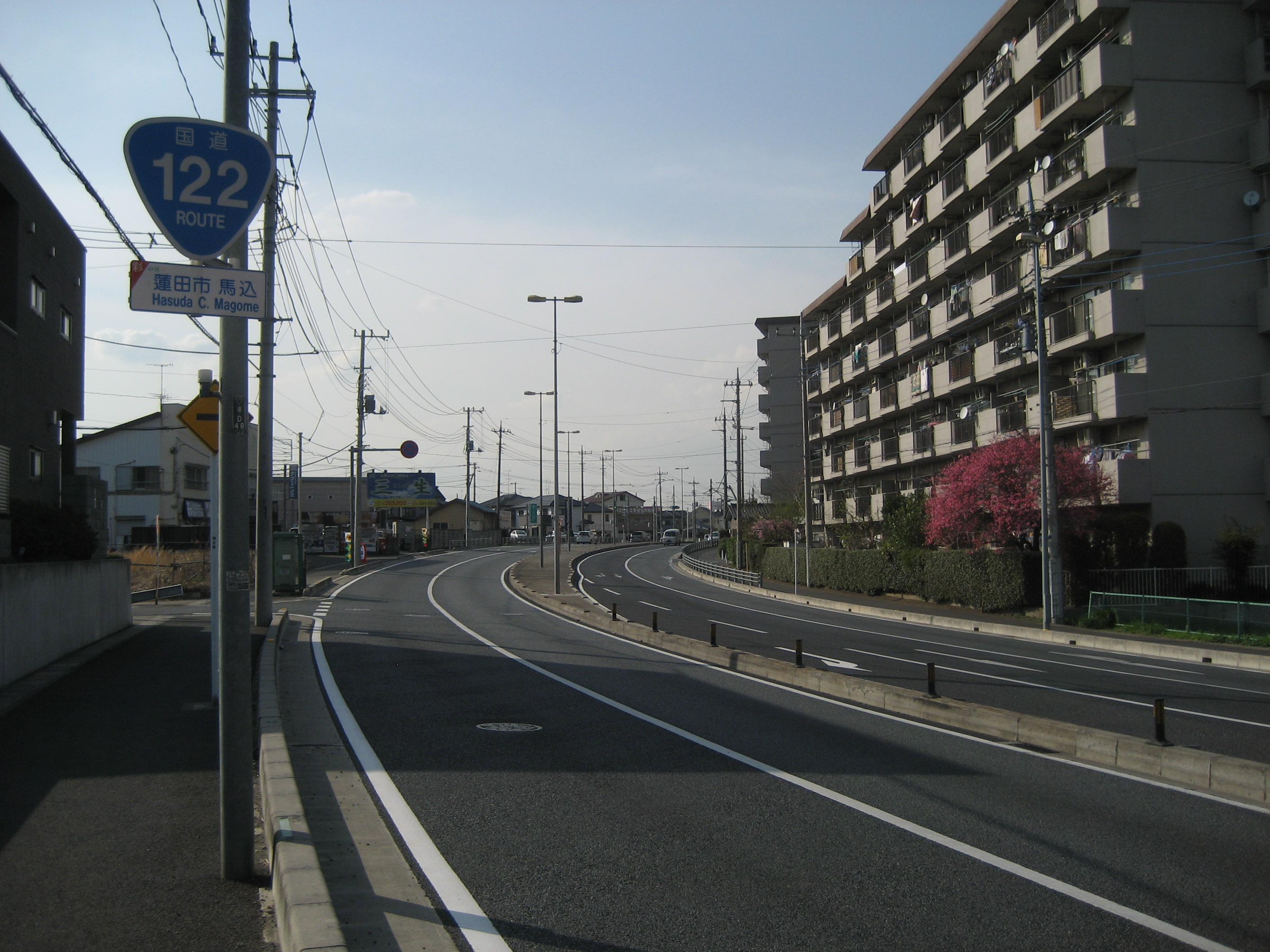 国道122号蓮田岩槻バイパス 蓮田市馬込付近